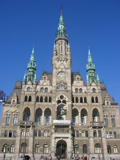 radnice v Liberci